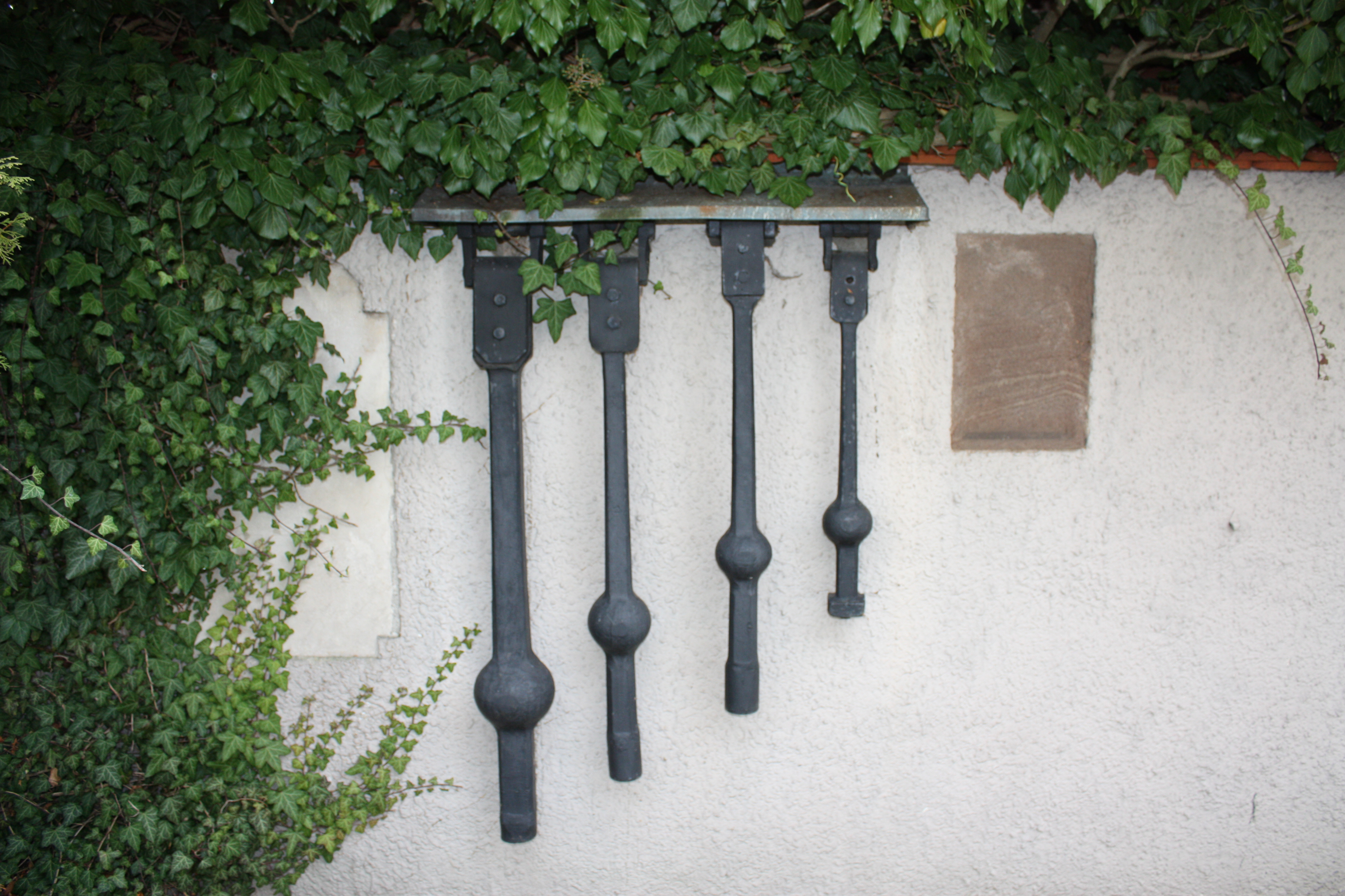 Die Klöppel der alten Glocken, St. Ulrich, Amendingen